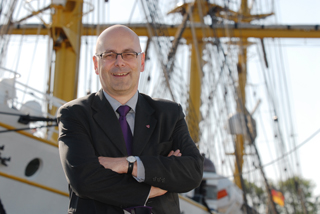 Torsten Albig auf der Gorch Fock. Foto: Landeshauptstadt Kiel/Thomas Eisenkrätzer